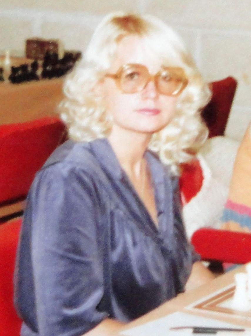 Hanna Erenska, Schacholympiade 1980 in Valletta auf Malta.